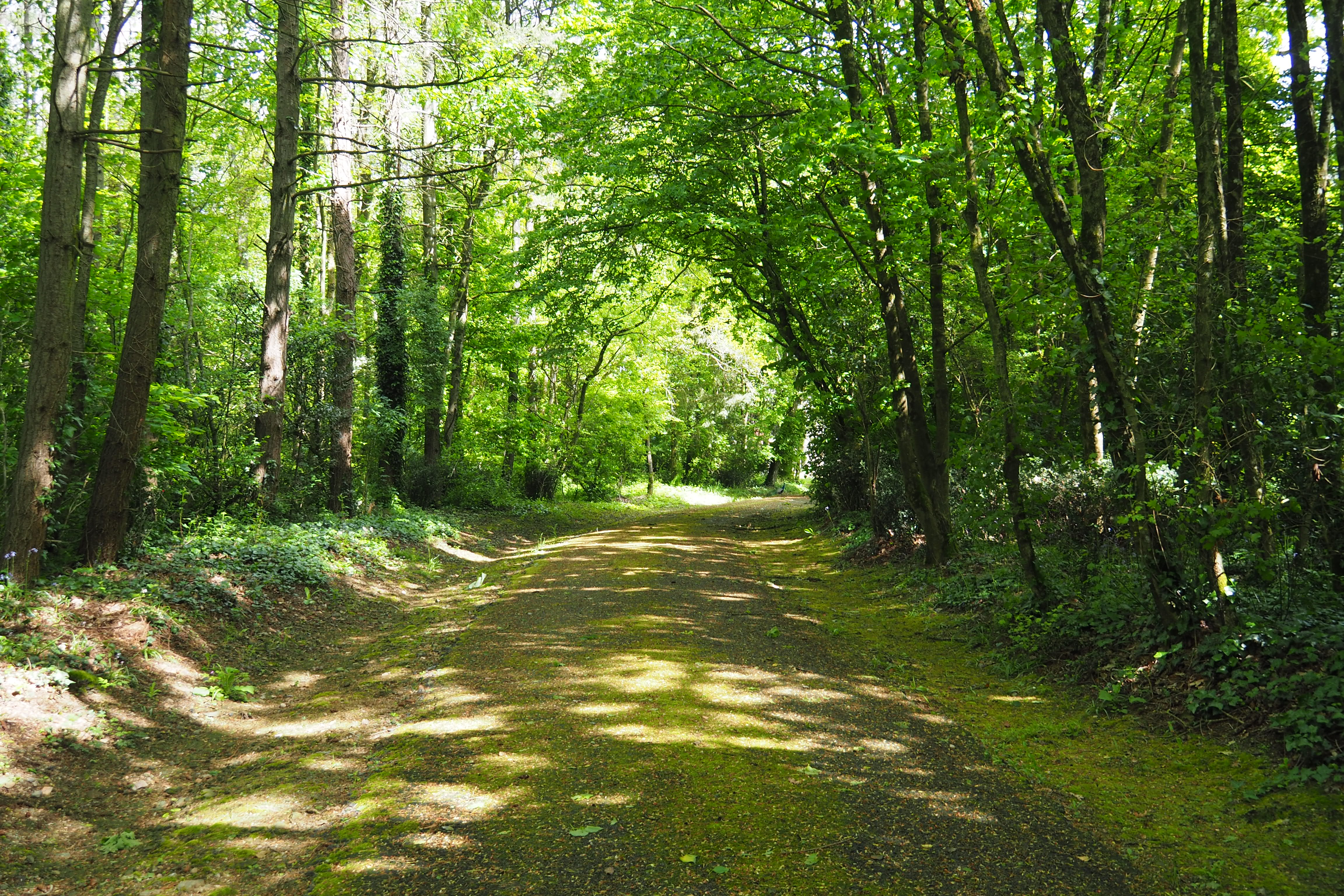 Allée sud